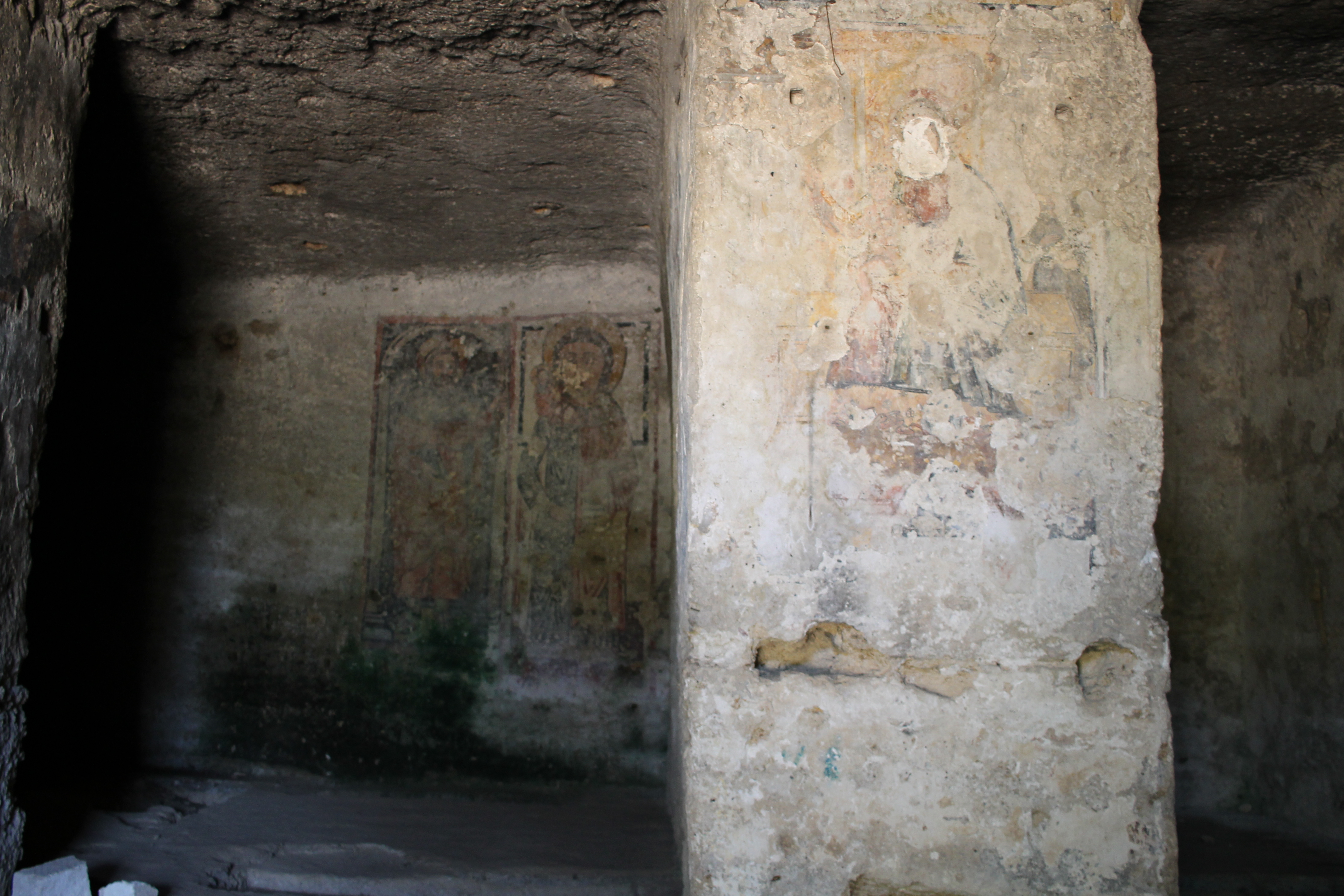 La Chiesa delle grotte Crocifisso rappresenta quella tipologia ecclesiastica cosiddetta “rupestre” (grotte o cavità naturali usate come abitazione o luogo di culto), oltre che essere un calzante esempio di convivenza di due culti: quello greco e quello latino.